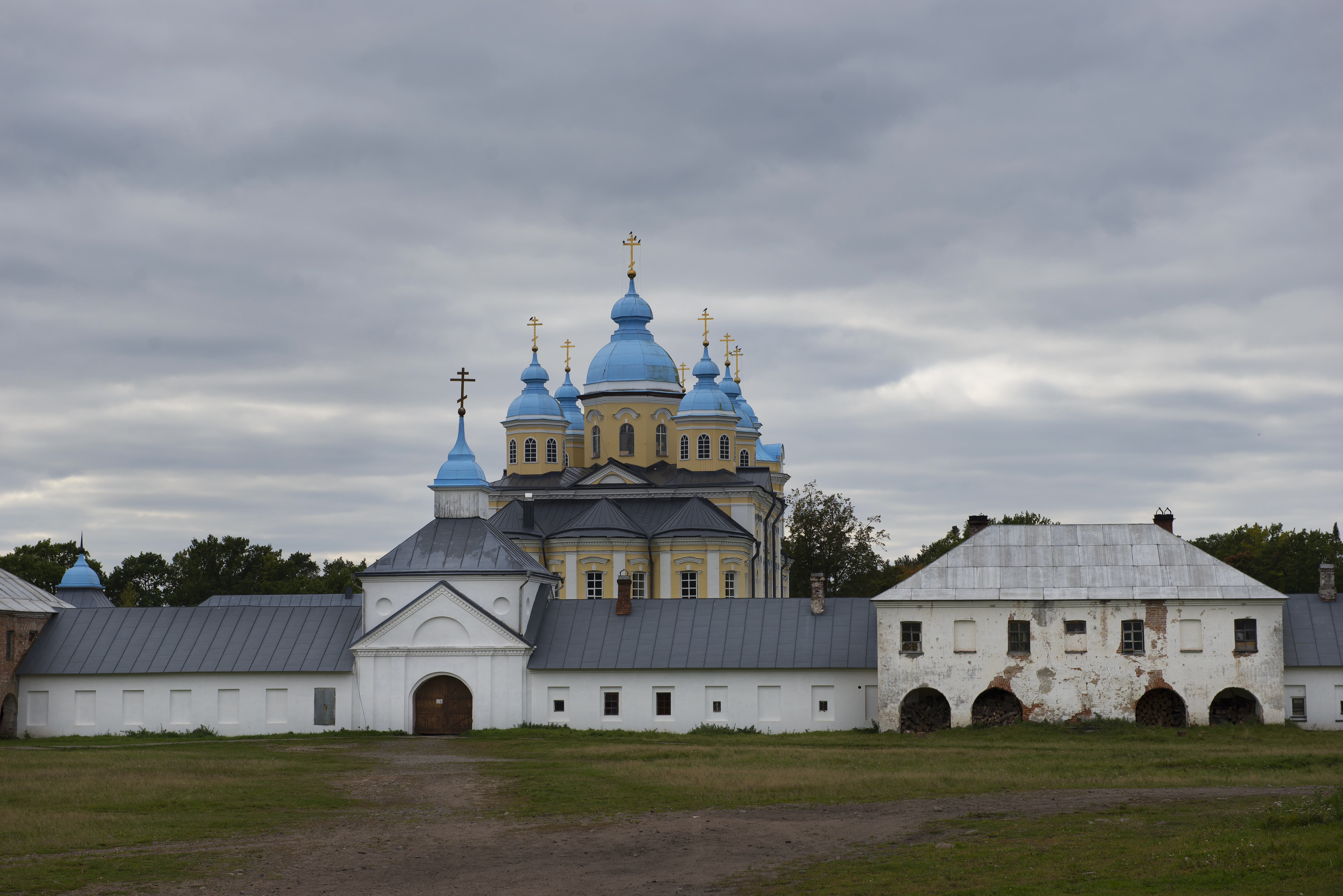 Монастырь Рождественский Коневецкий: о.Коневец, Приозерский район, Ленинградская область